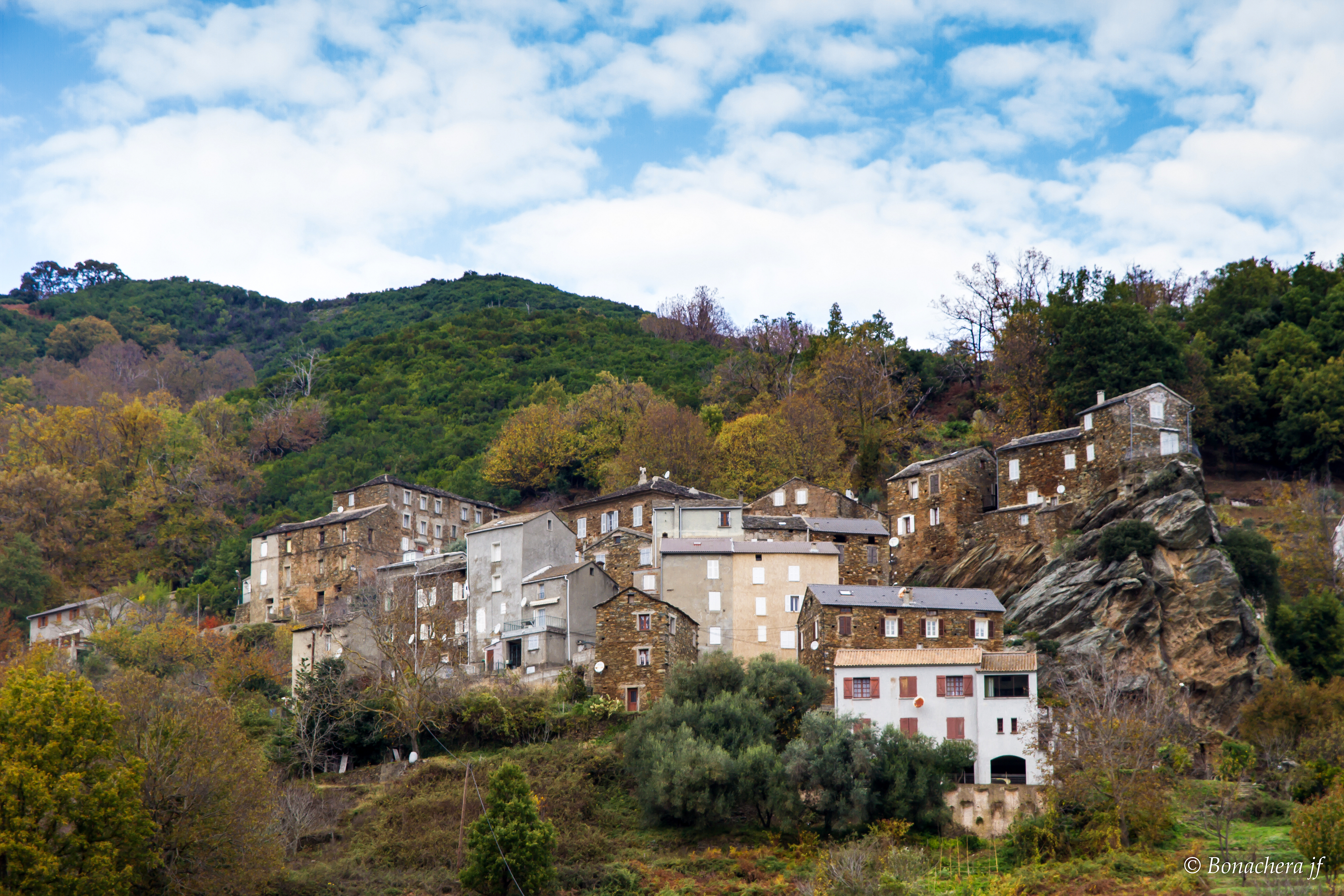 Pietra-di-Verde (Haute-Corse) - hameau du Montichju et "a Tozza"